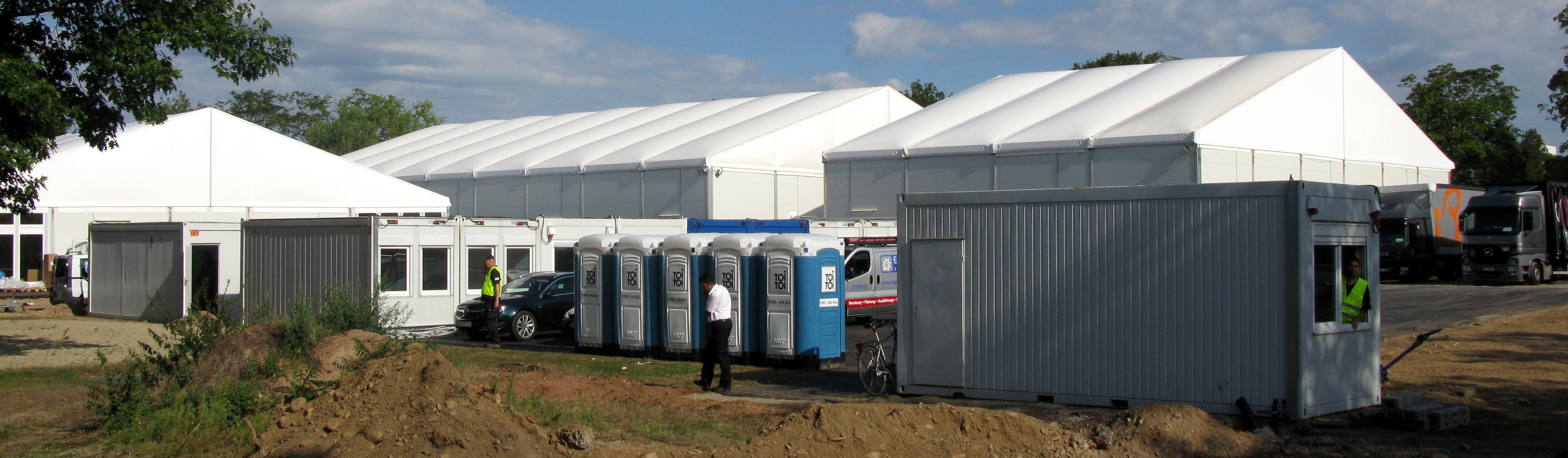 Bedarfsorientierte Erstaufnahmeeinrichtung (BEA) für Flüchtlinge in Freiburg-Haslach